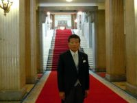 松崎公昭（倫選特委員長として）